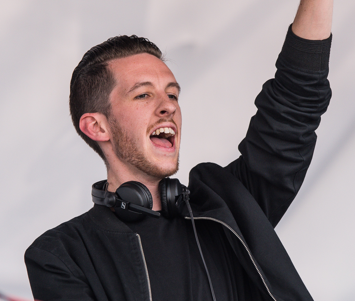 Bruce Fielder,Festival,Konzert,Livekonzert,Livemusik,Mainstage,Musik,Open Beatz 2016,Sigala